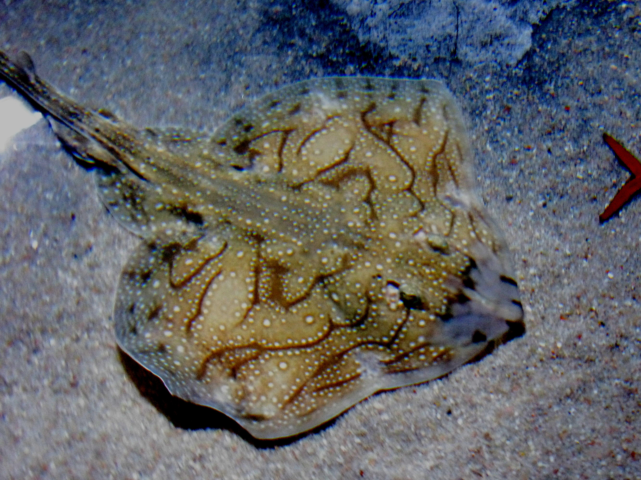 Undulate ray (Raja undulata)